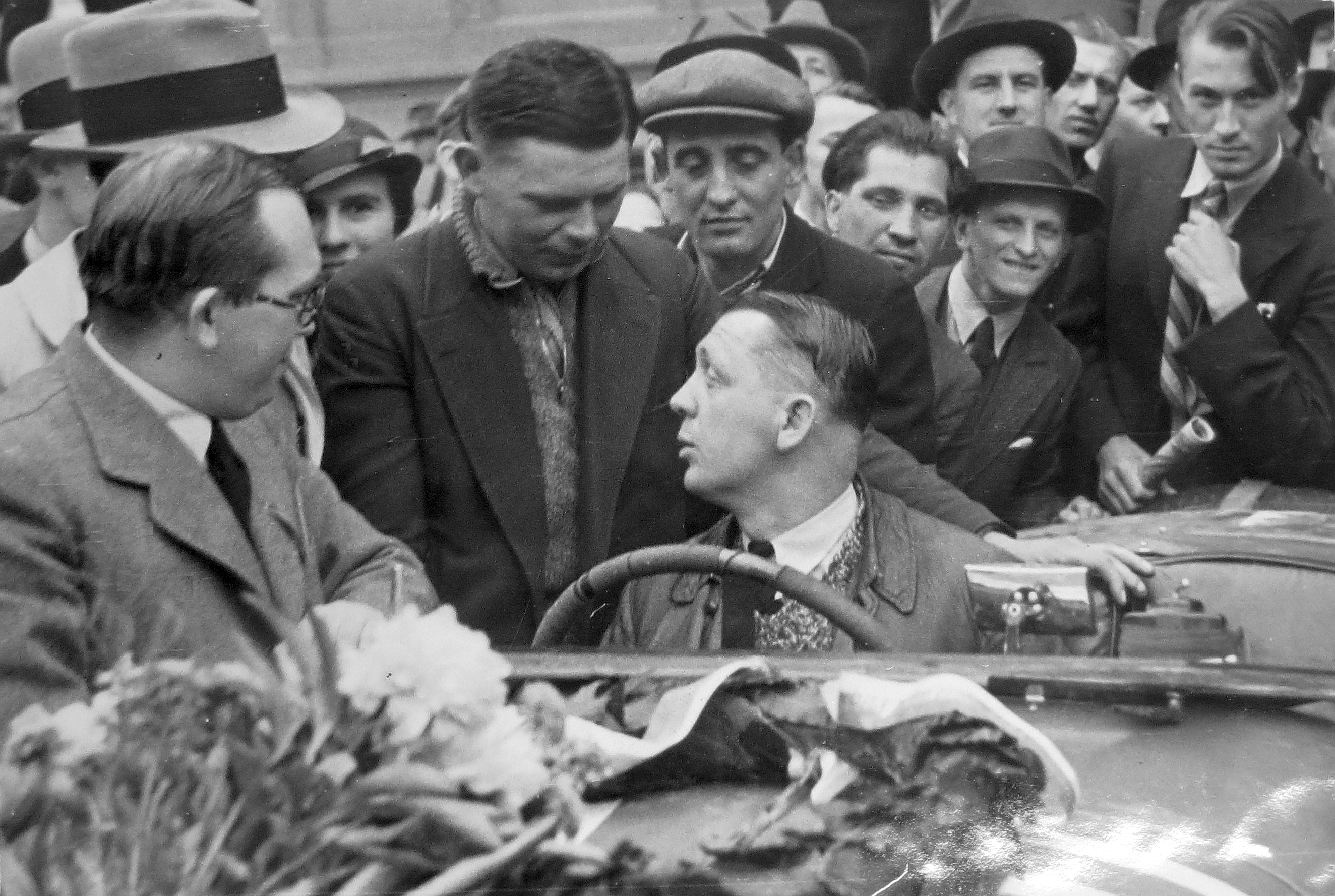 V cíli 1000 mil čsl., vítězný Jindřich Knapp se spolujezdcem Karlem Vojířem (1934)